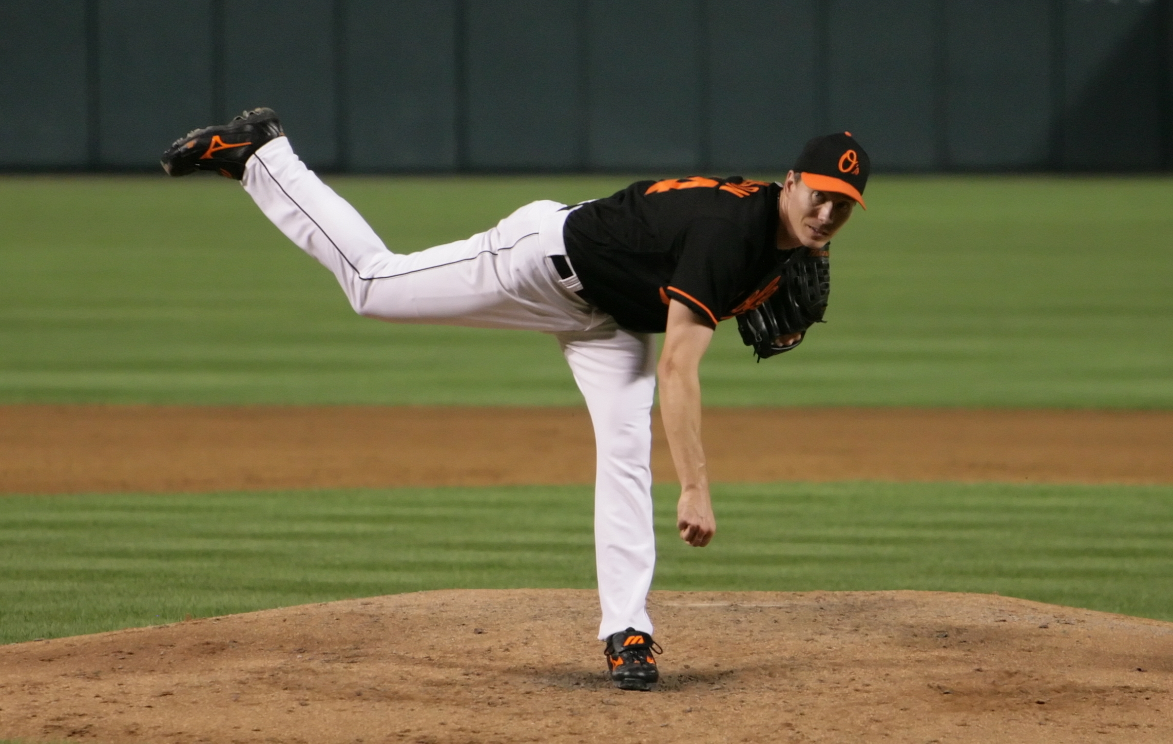 Kris Benson